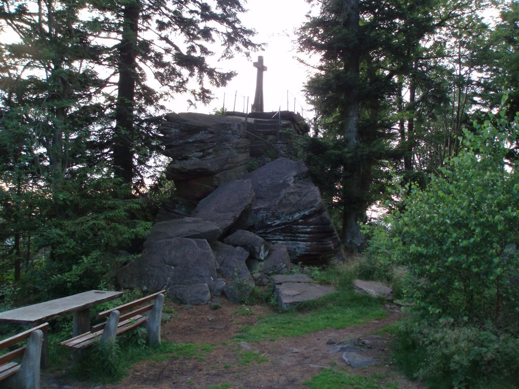 Bernsteinfels im Nordschwarzwald, ein Naturdenkmal aus Buntsandstein